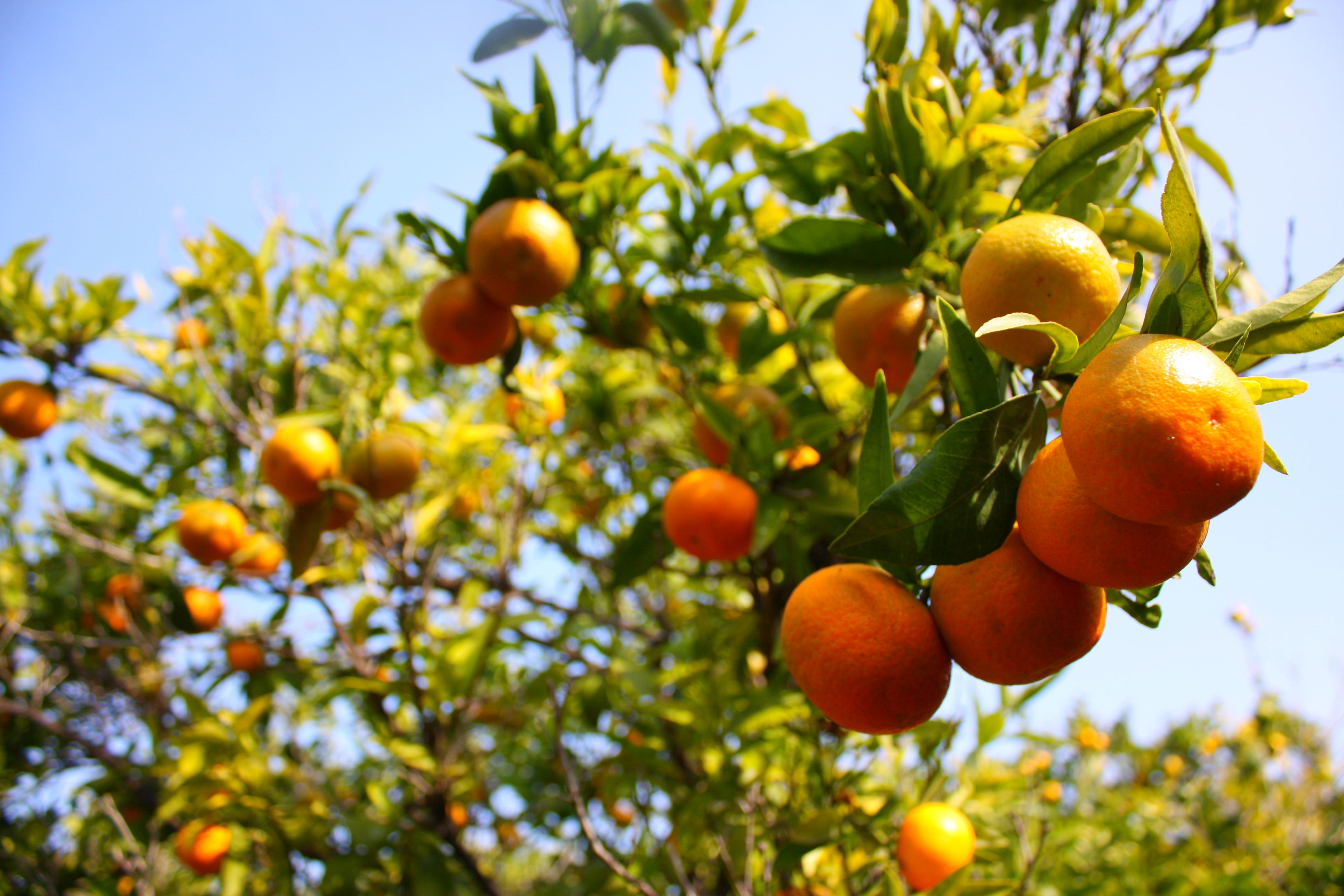 Narancsok sorakoznak a ligetek fáin, Görögországban